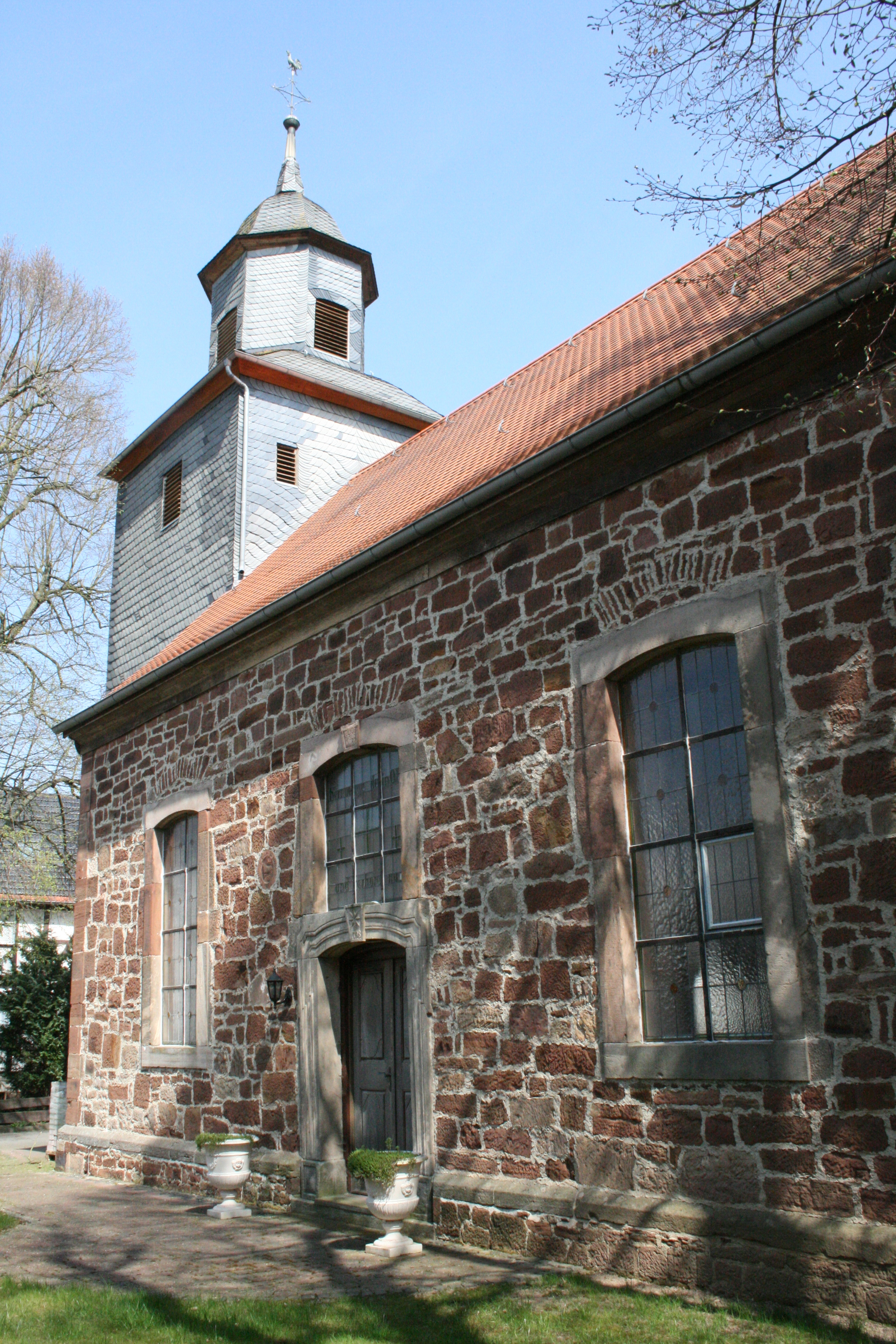 Kirche in